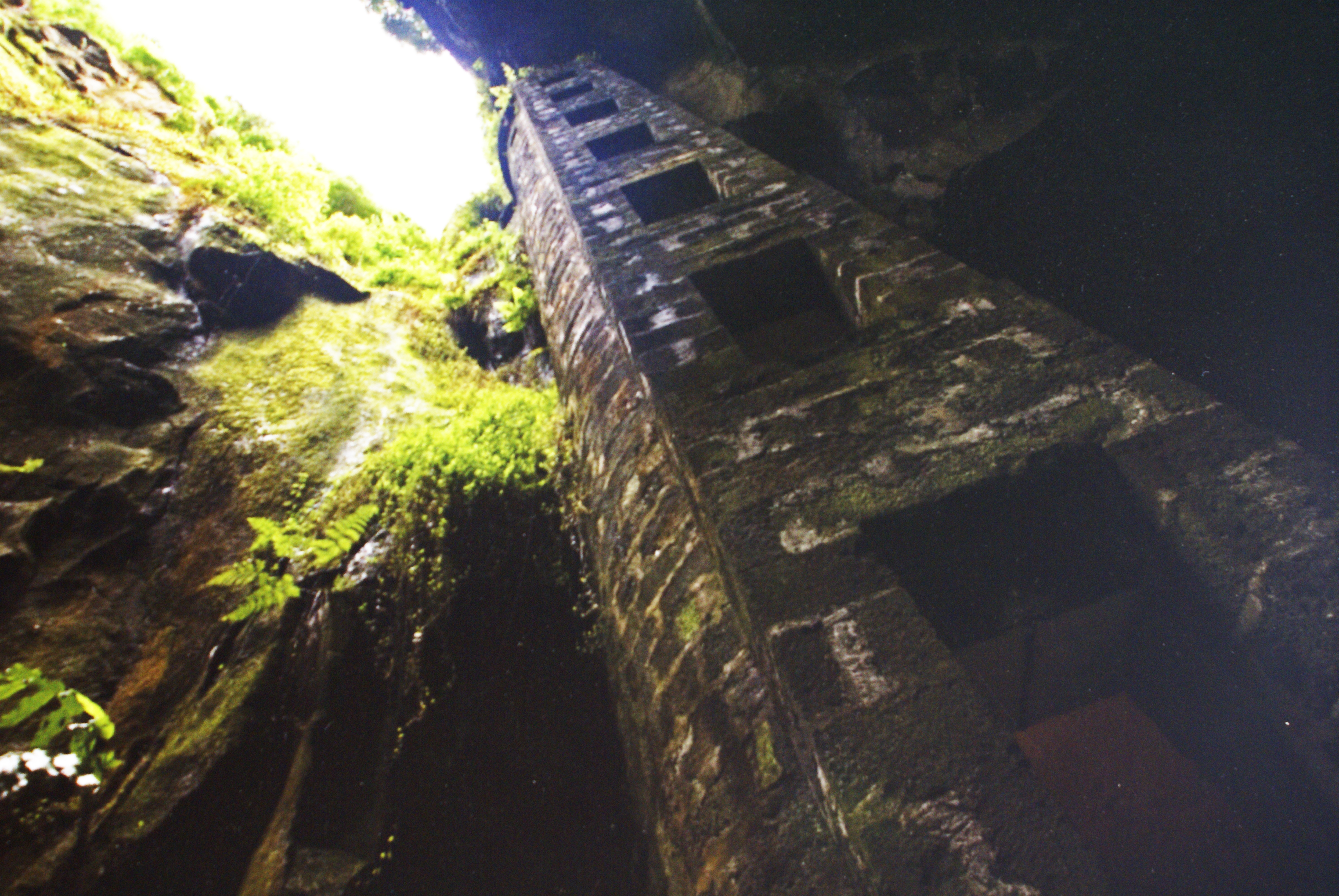 Furna do Enxofre, descida, ilha Graciosa, Açores, Portugal